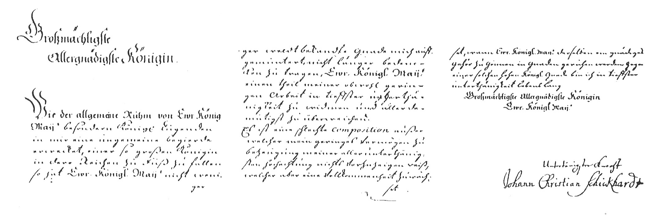 Widmung an Ulrike Eleonre Königin von Schweden im Konzert g-moll für Altblockflöte und Orchester von Johann Christian Schickhardt